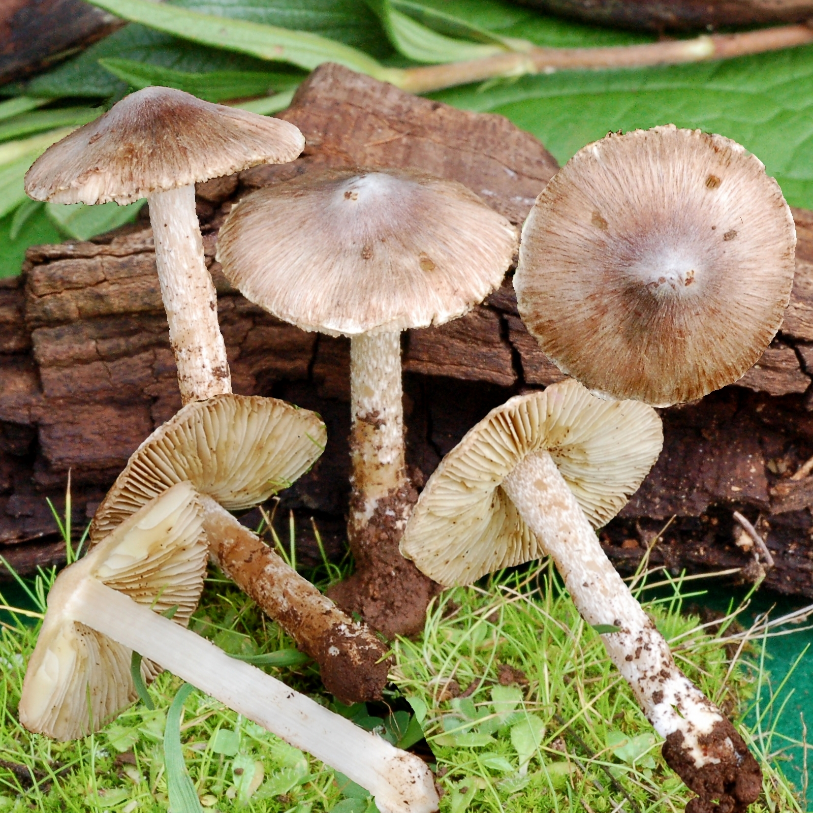 Inocybe arenicola var. mediterranea, Montage aus zwei Fruchtkörpern